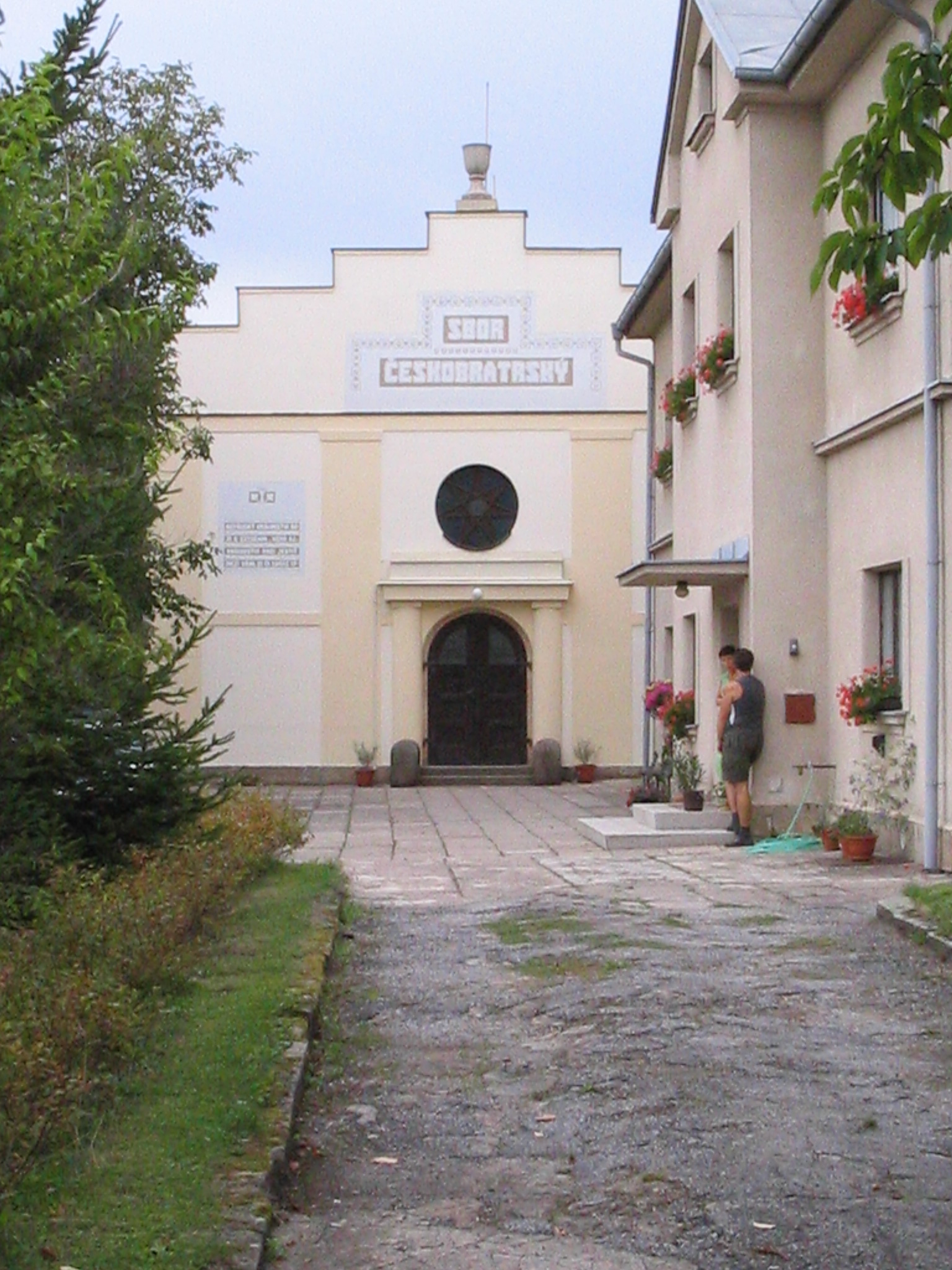 Kostel (vpředu) a fara (vpravo) ČCE ve Dvoře Králové